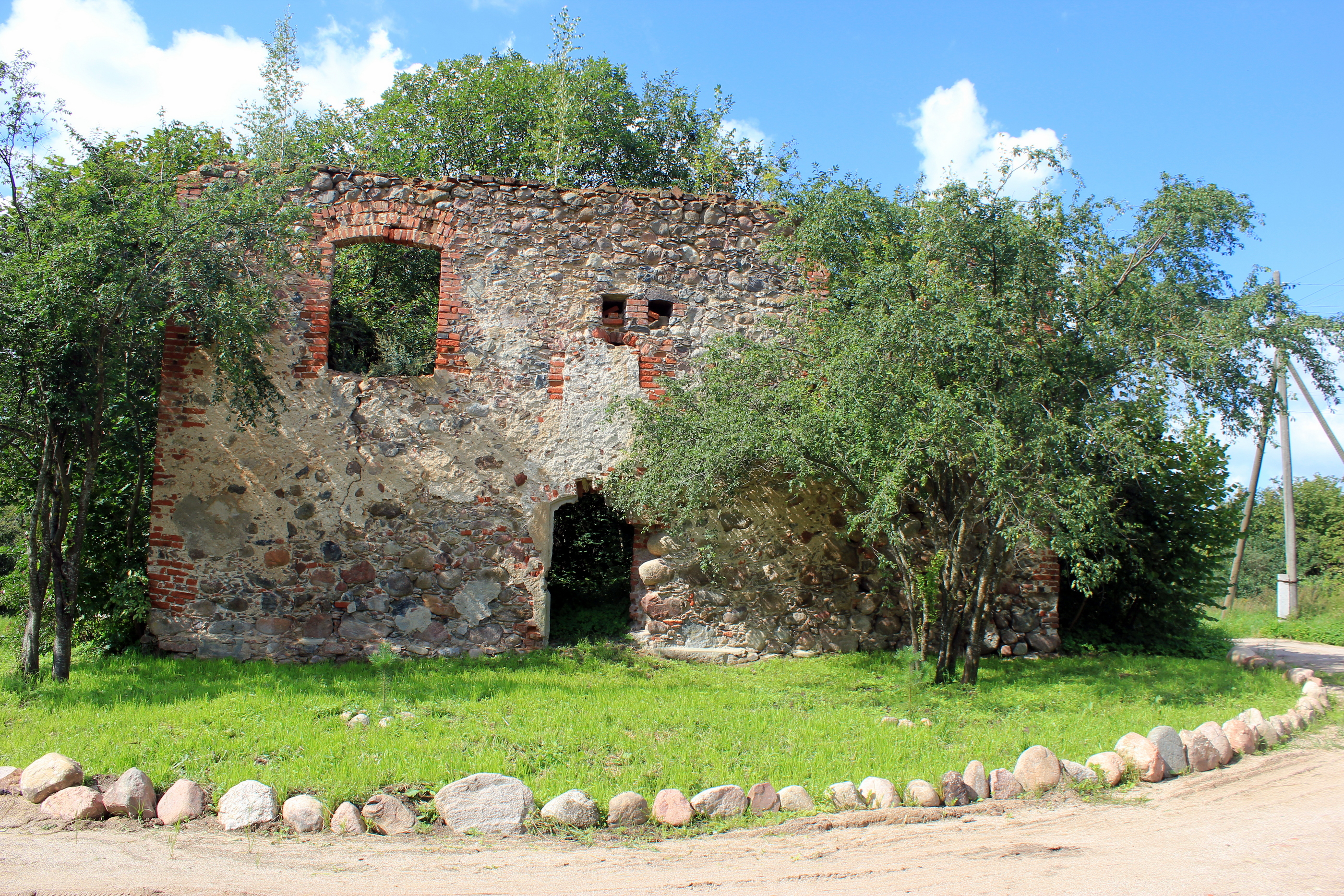 Kirchenruine in Wesnowo (früher Kussen), Oblast Kaliningrad, Russland.